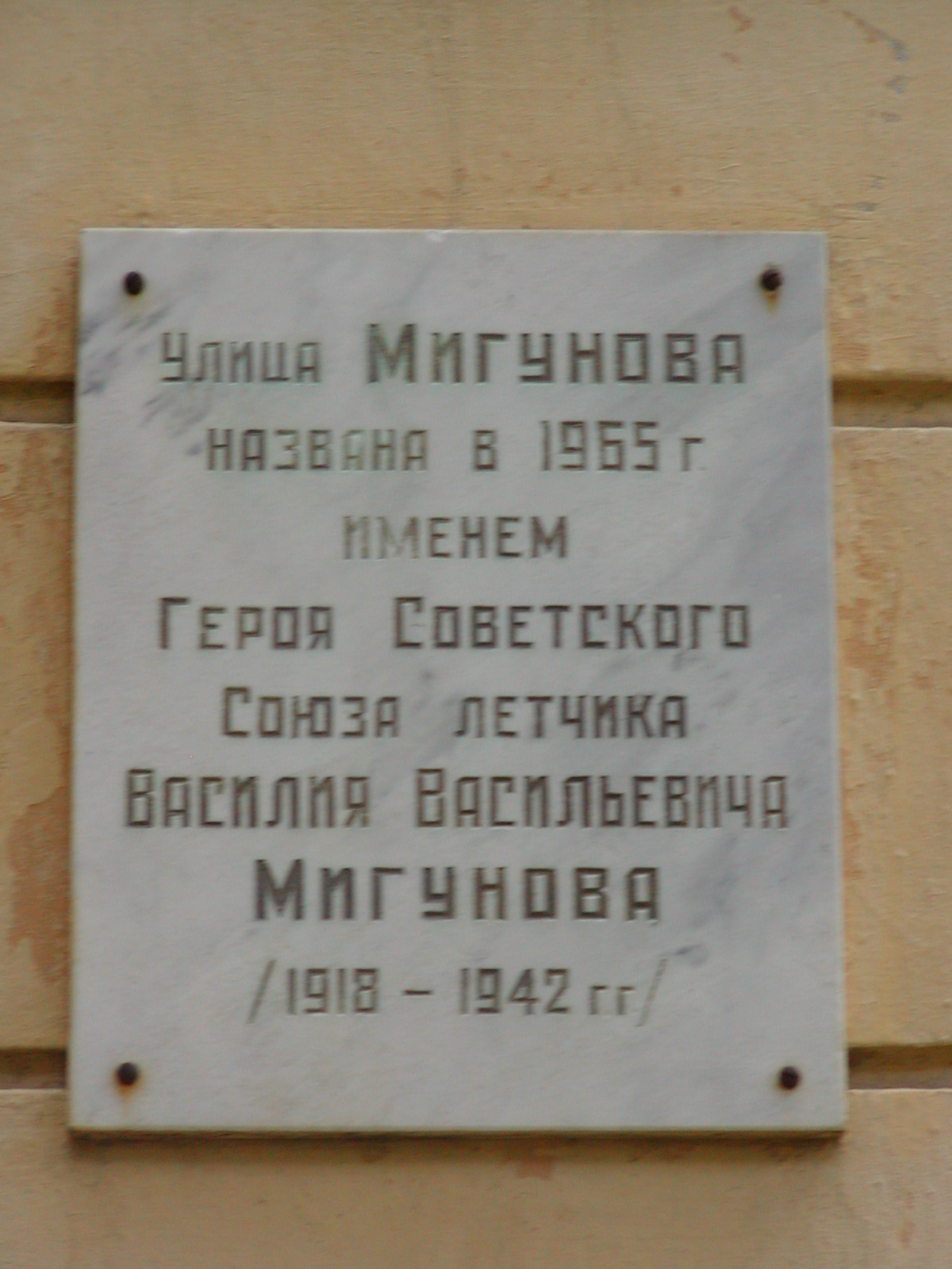 Памятная доска на доме № 11/6 по проспекту Ленина в Обнинске.